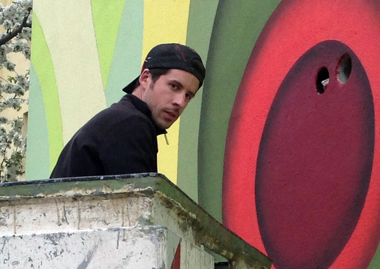 Streetartista Jan Kaláb během malby ve Strašnicích v Praze 10. Duben 2013.